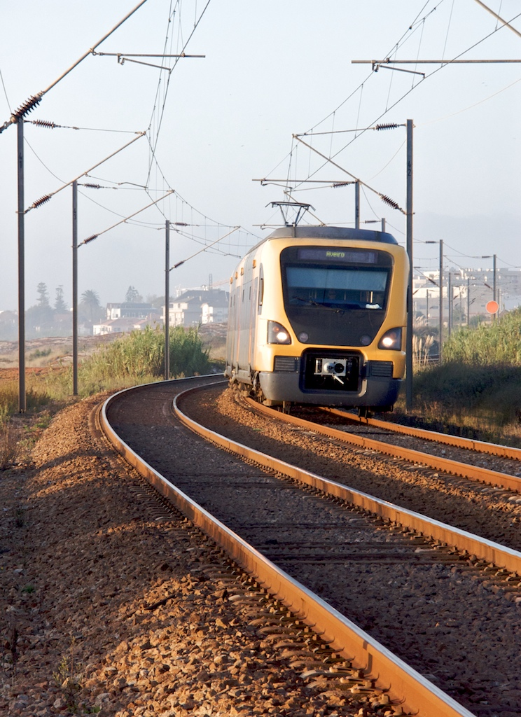 Tipo: Comboio Urbano 15742 [Porto • Campanhã - Aveiro] Local: São Félix da Marinha [Linha do Norte, PK 318] Data e hora: 15 de Outubro de 2008 [18h11] Material: Automotora 34xx [Unidade Múltipla Eléctrica]